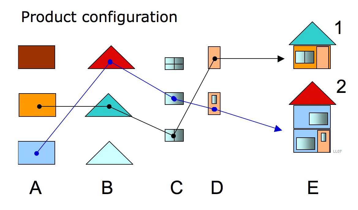 Product configuration process